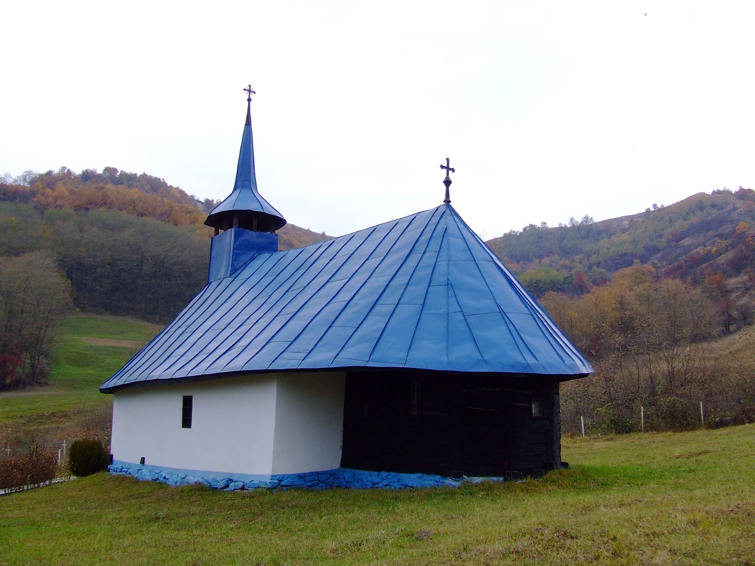 Biserica de lemn a mănăstirii Bălan, Sălaj. Autor: Bogdan Ilieş Data: 4 noiembrie 2006